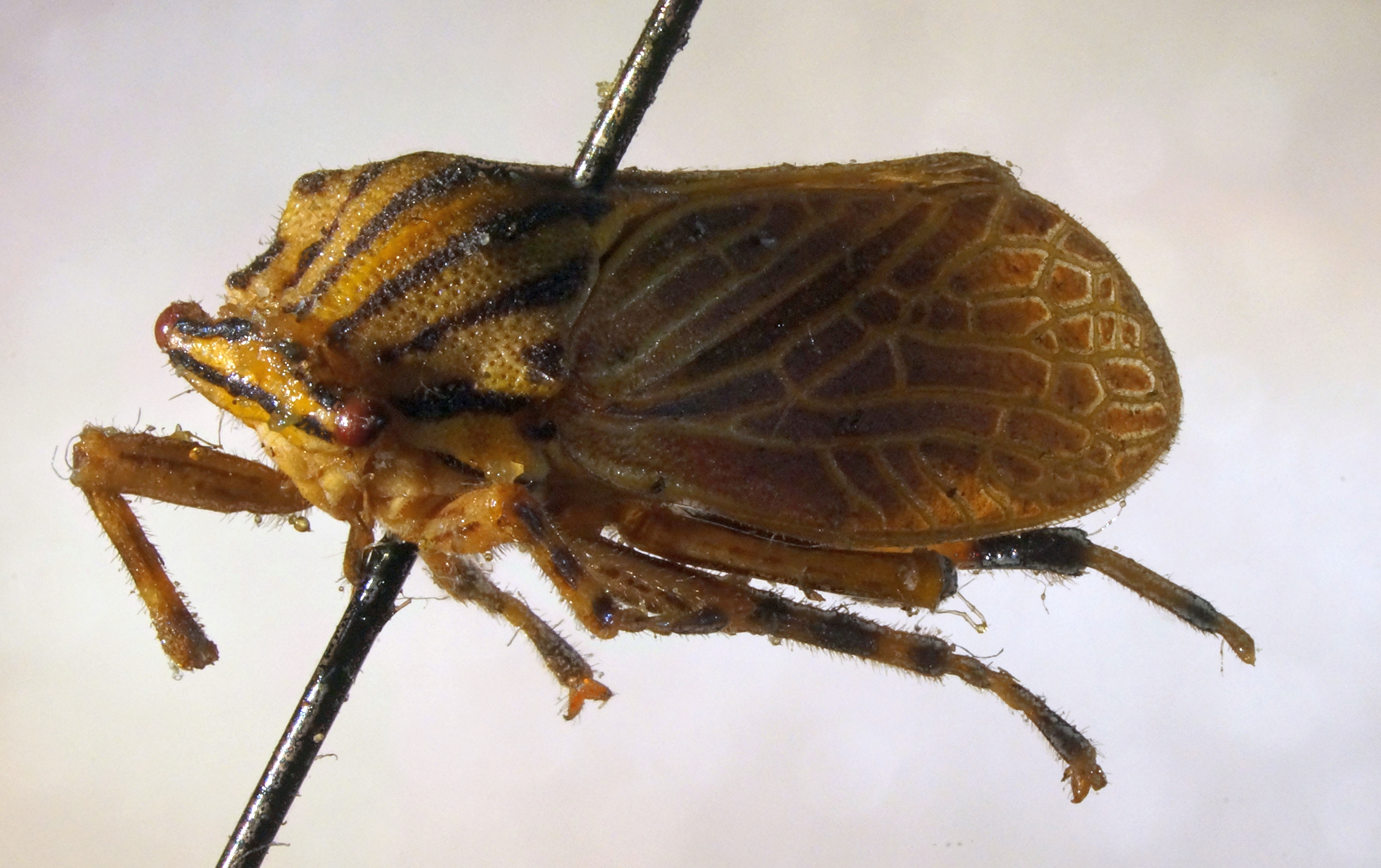 Aetalion vitticolle Stal, 1869; Sammlungspräparat aus der Zoologischen Staatssammlung München